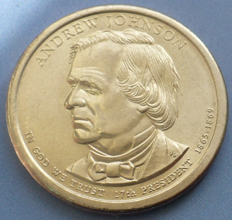 Изображение/Монета 1 доллар США